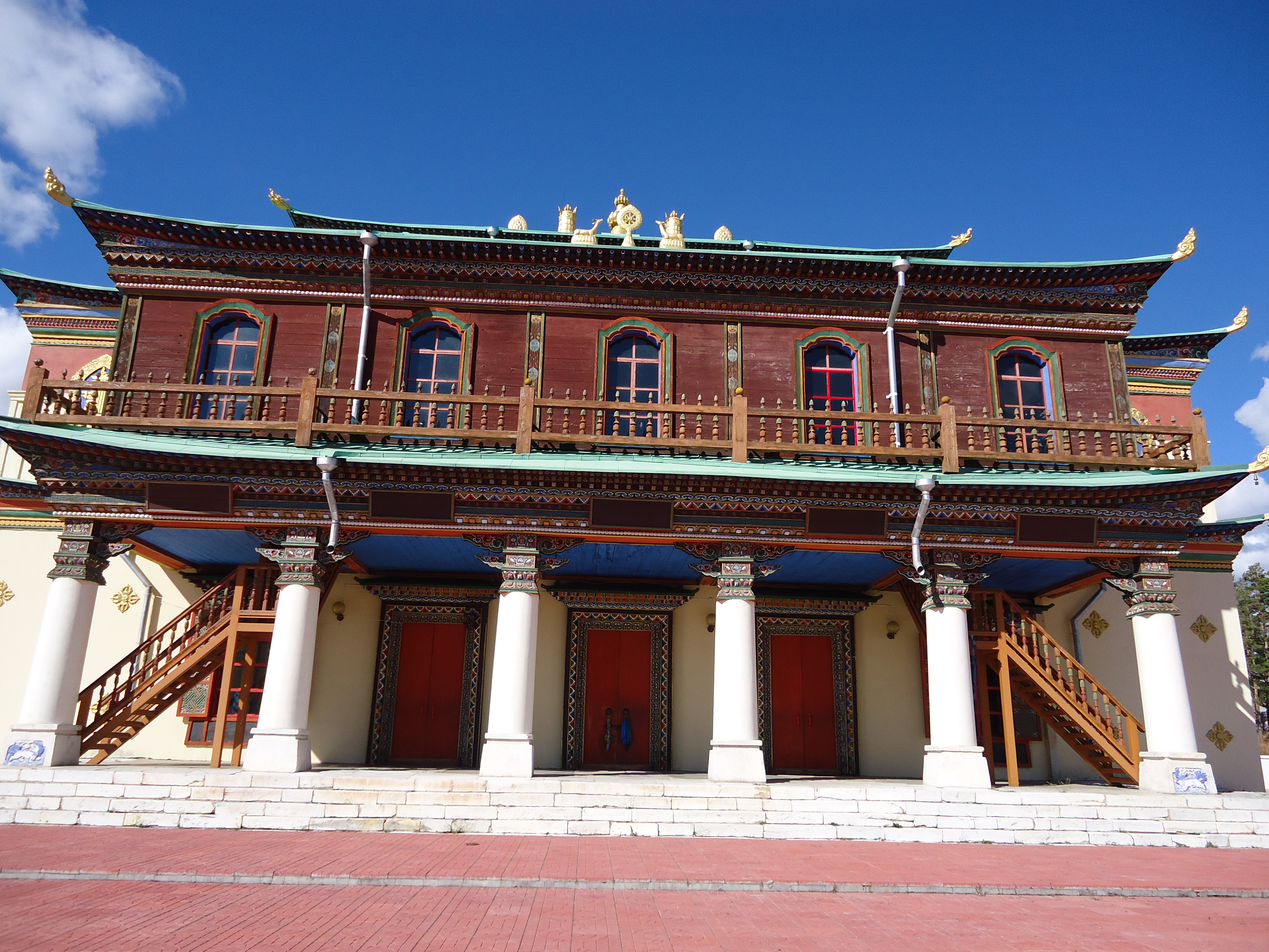 Буряад: Проводят большой хураал в раз в год. Всю ночь до утра мол-ся